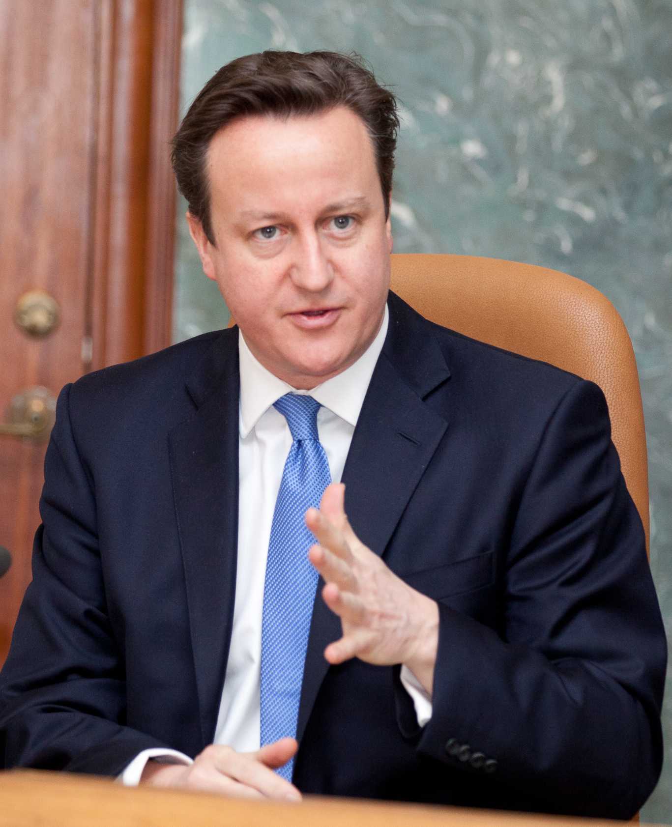 Ministru prezidenta Valda Dombrovska tikšanās ar Apvienotās Karalistes Ministru prezidentu Deividu Kameronu. Foto: Toms Norde, Valsts kanceleja